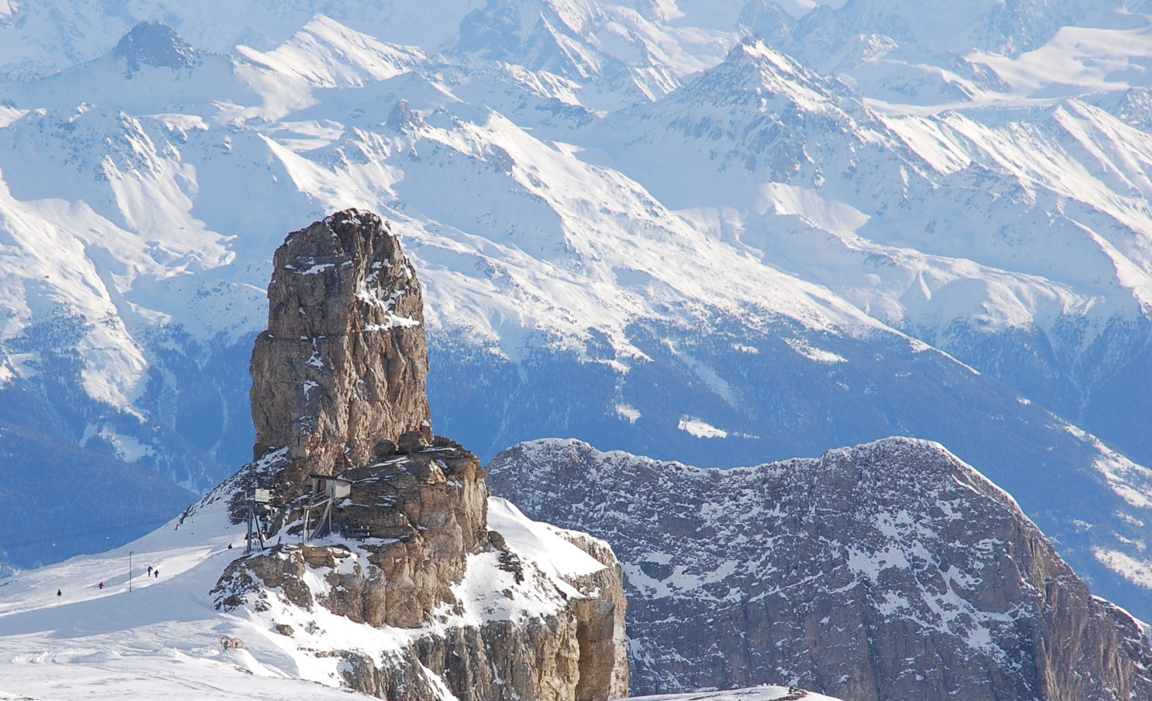 La Tour Saint-Martin ou Quille du Diable sur la commune de Savièse Valais-Suisse et les pistes de ski des Diablerets dans le canton de Vaud.